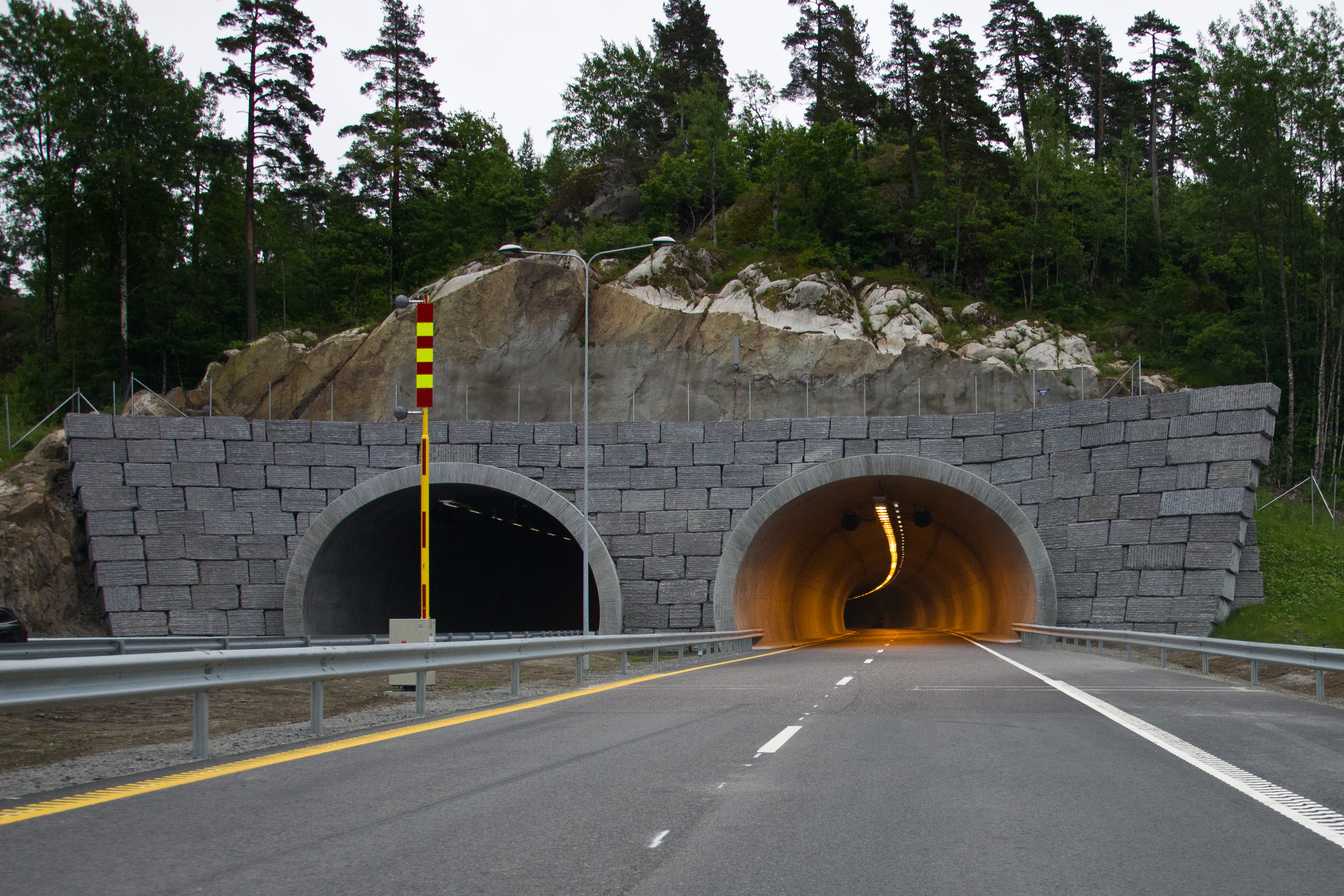 Hobekksetertunnelen, E18, Larvik, Vestfold. Sett fra vest.